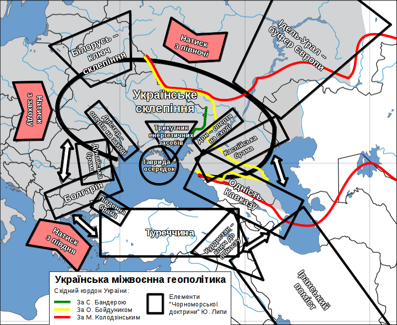 Міжвоєнні українські геополітичні концепції. Джерела: Ю. Липа. "Чорноморська доктрина", 1940 О. Бойдуник. "Соборність України та її східні кордони", 1930 М. Колодзінський. "Українська воєнна доктрина", 1935-1937 С. Бандера. "Фронт поневолених націй", 1950